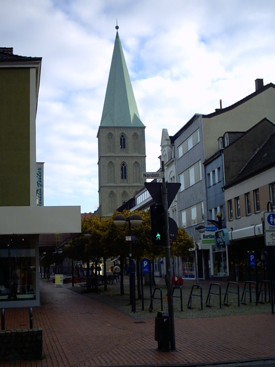 Pauluskirche in Hamm/Westfalen, fotografiert von Dr. Detlef Berntzen am 14.11.2004, gemeinfrei